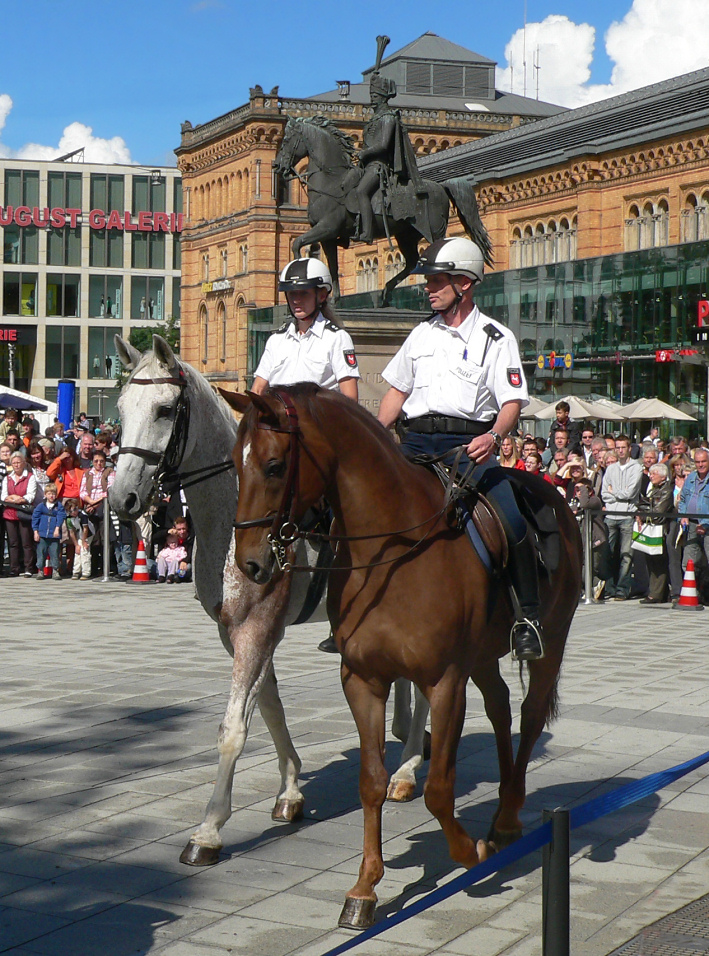 Vorführung Polizeipferde Niedersachsen, Fotoaufnahme bei Veranstaltung "Polizei erleben" am 04./05.09.10 in Hannover auf dem Ernst-August-Platz